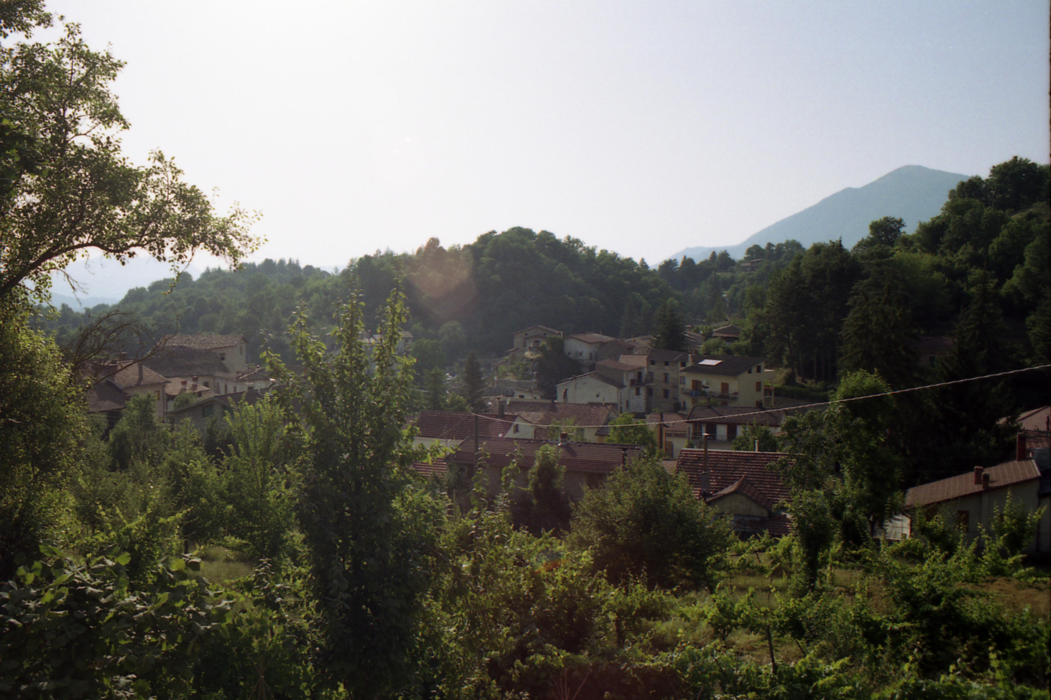 Veduta della frazione Torre di Taglio di Pescorocchiano (RI) con il Monte tra le Serre sullo sfondo